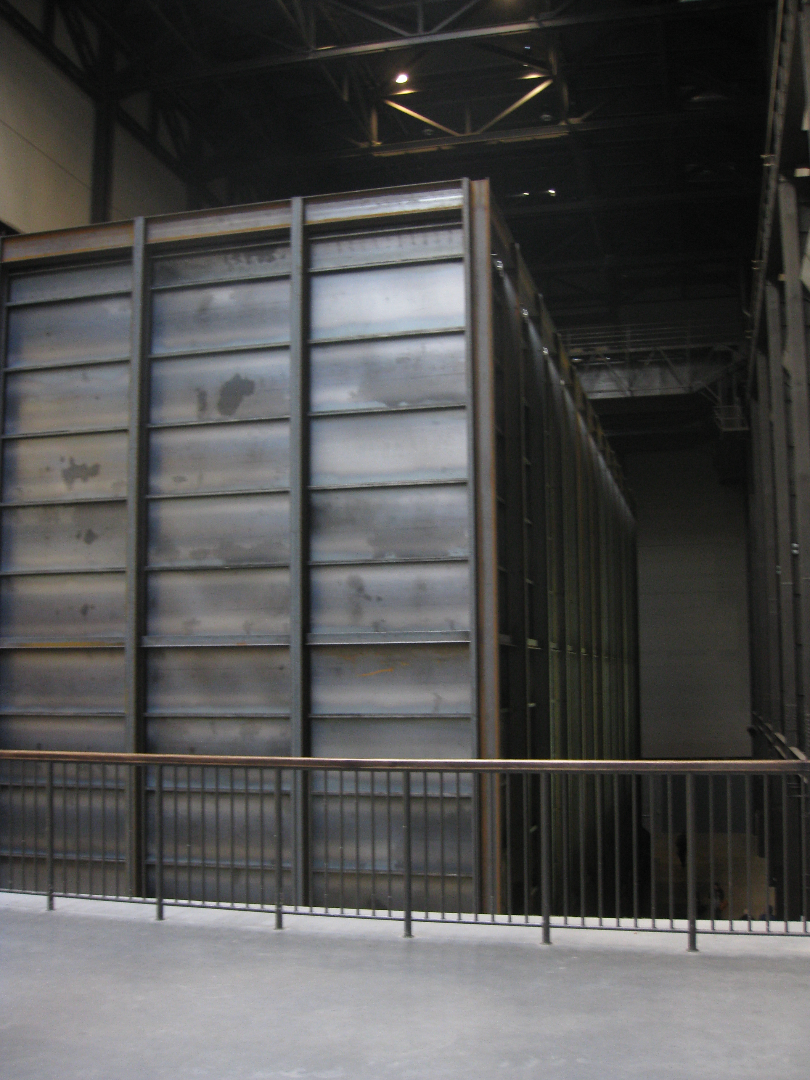 Tate Modern - Turbine Hall אולם הטורבינה בטייט מודרן